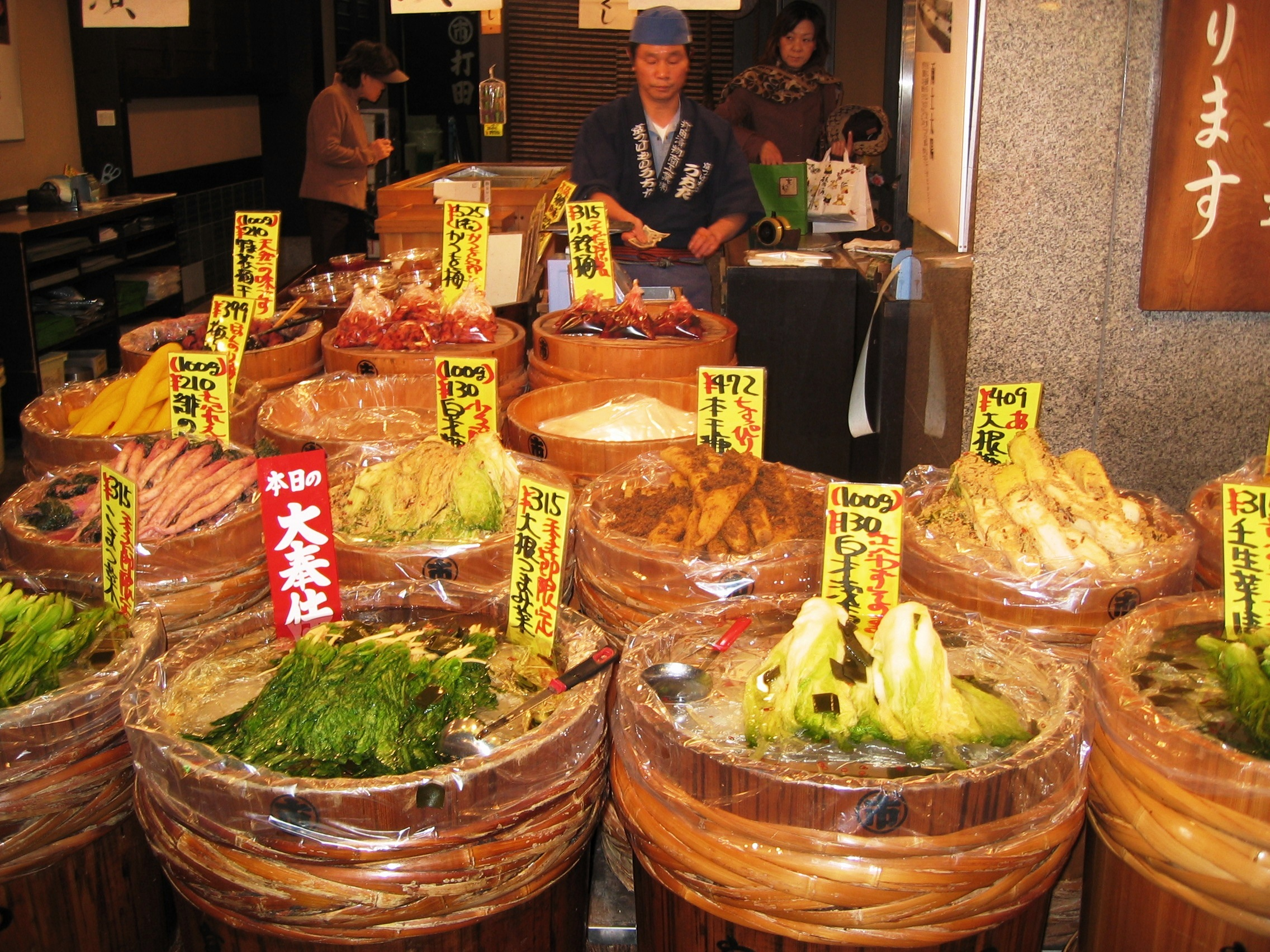 漬物屋（京都中京区錦小路通柳馬場西入ル中魚屋町484、錦市場の漬物屋「打田漬物」[1]錦小路店[2]）